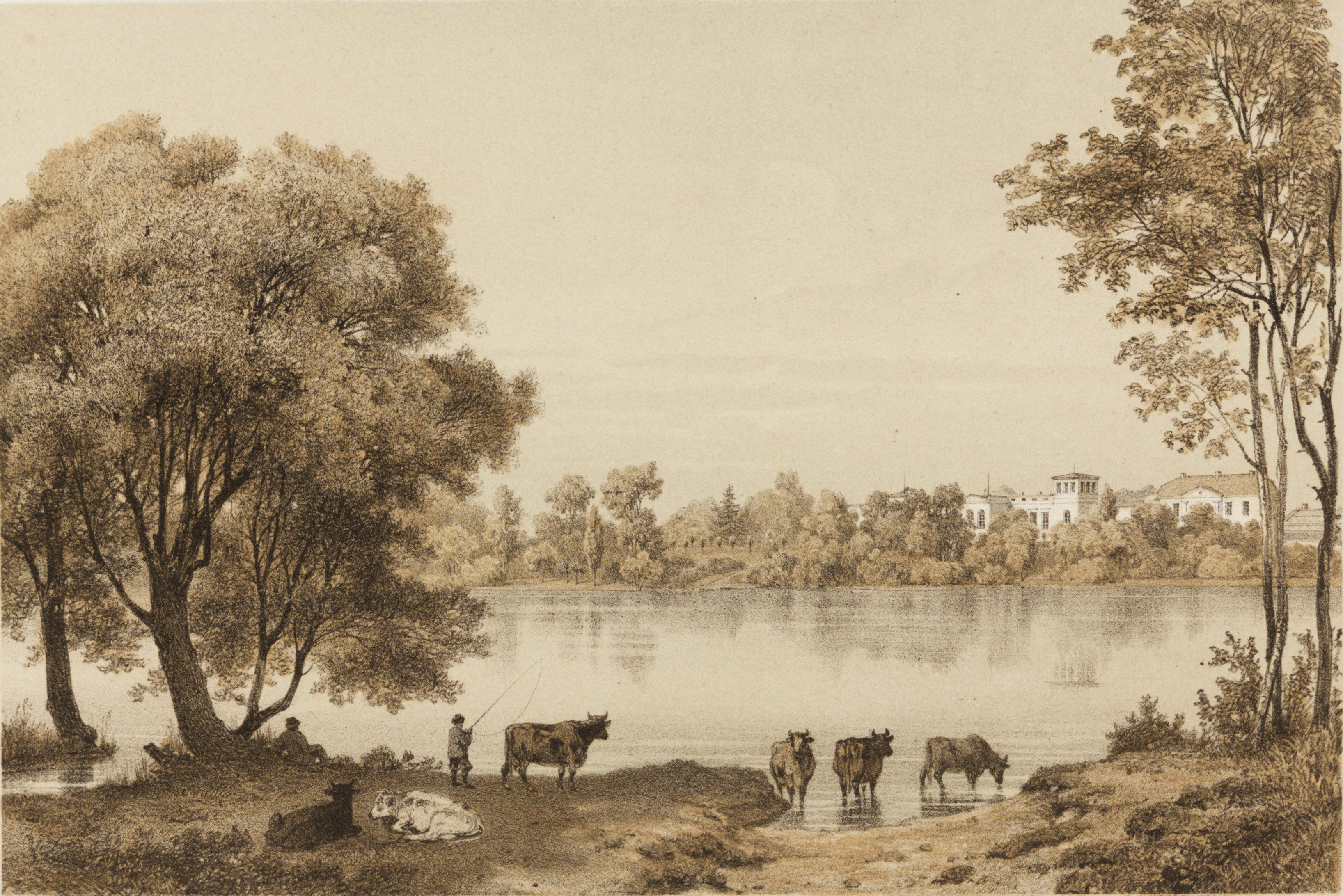 Tartu album. Raadi mõis. MUIS: TKM TR 4038 H 31:12